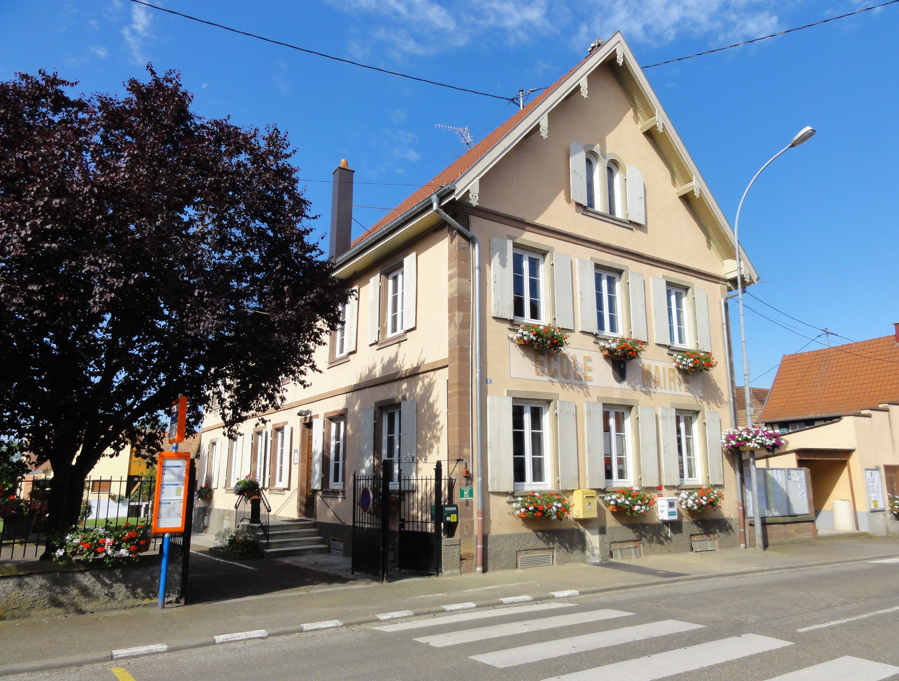 Alsace, Bas-Rhin, Bilwisheim, Mairie-école.}